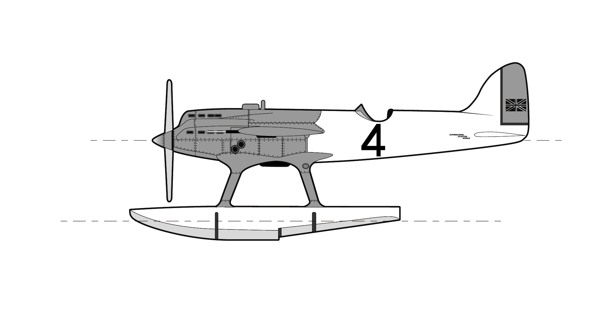 Supermarine S.4 Profil illustrator